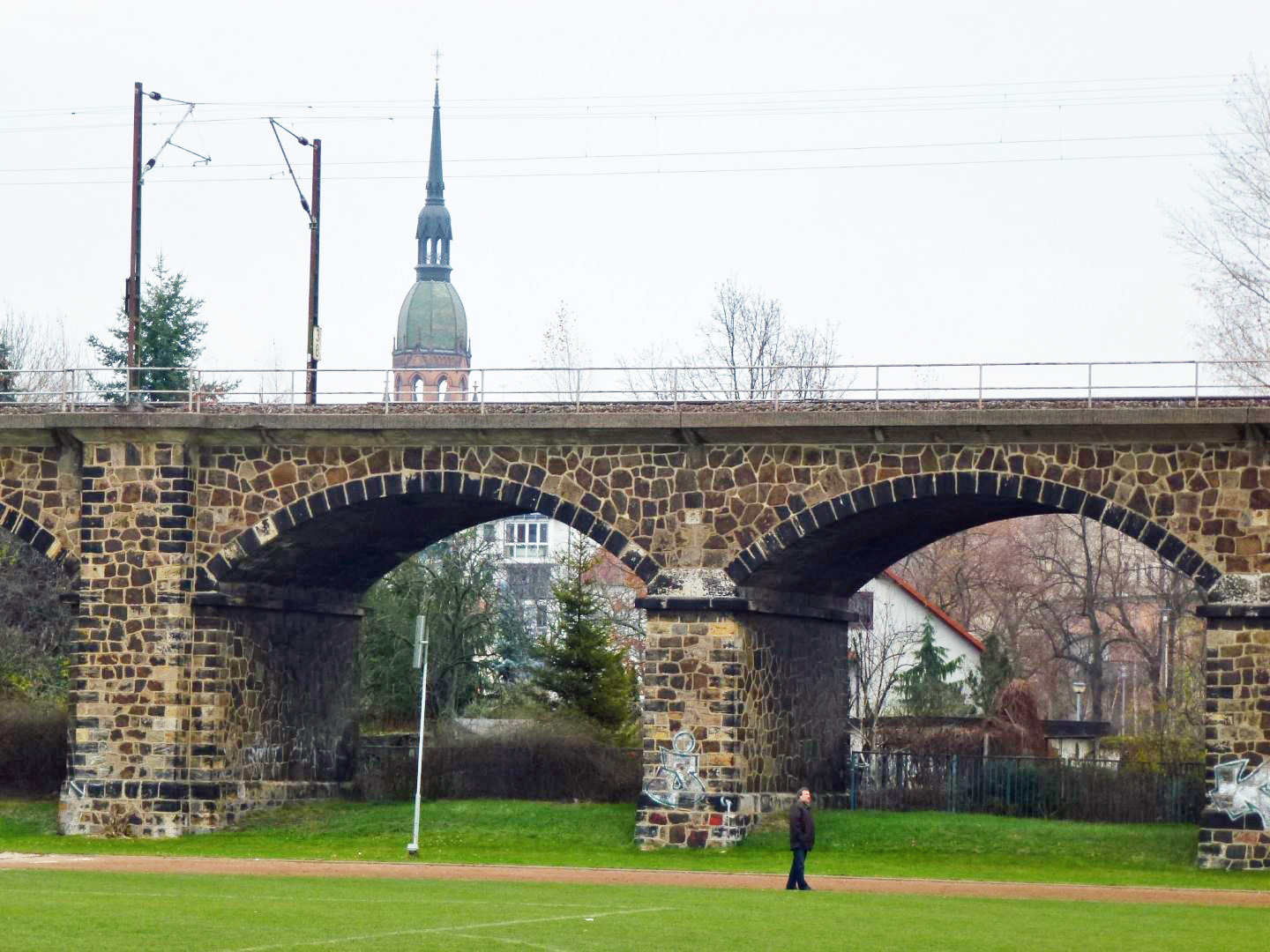 Sellerhäuser Eisenbahnviadukt, im Hintergrund die Emmauskirche